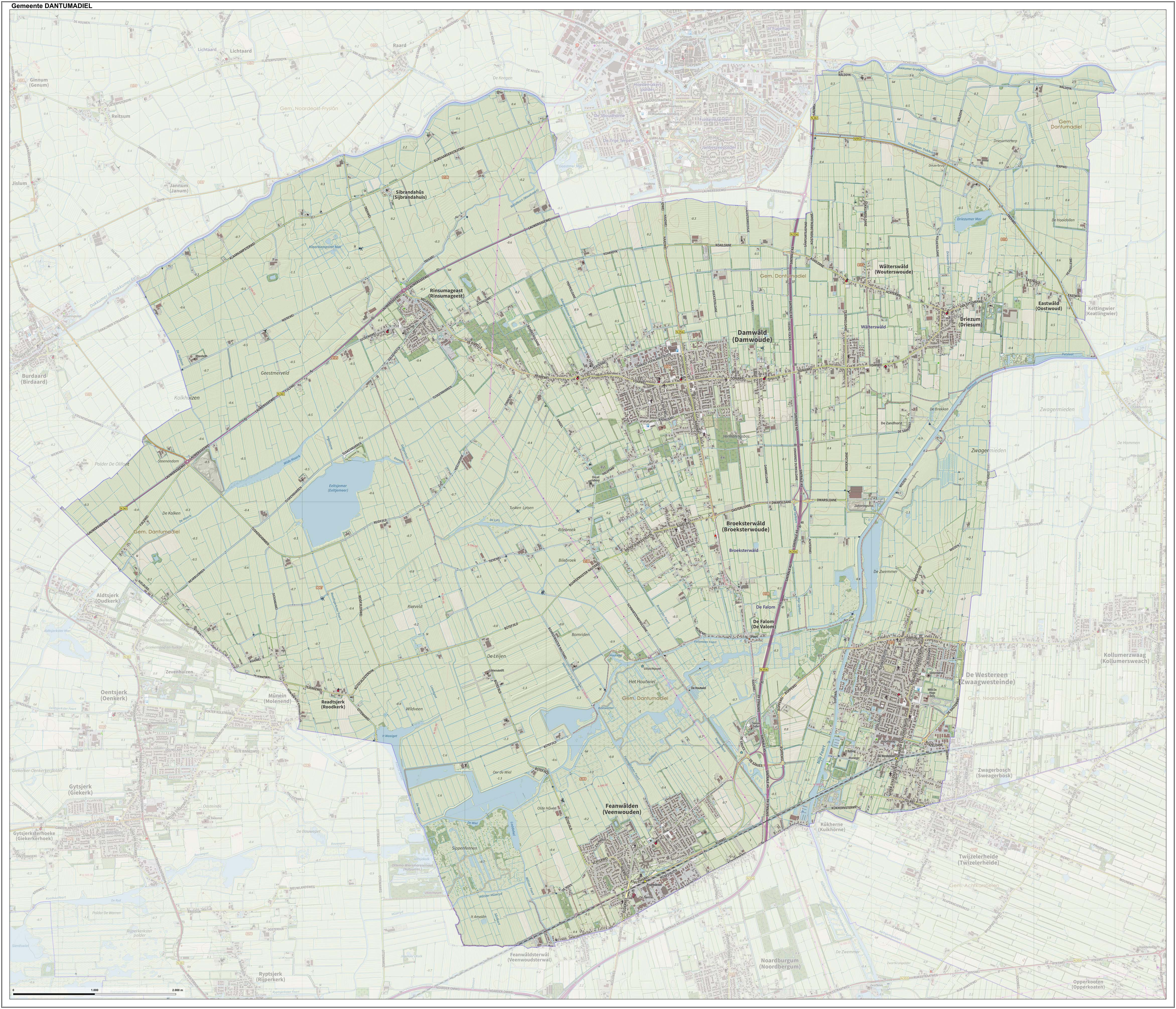 Topografische gemeentekaart. Resolutie: 400 pixels/km. Kaartbeeld samengesteld uit de open geodata van de Top10NL en Top25namen (Kadaster), Creative Commons-BY licentie. Gebouwvlakken uit open geodata BAG extract. Wegen uit de OpenStreetMap, OpenStreetMap community. Reliëfschaduw uit de Actuele Hoogtekaart AHN2. Samenstelling en kleurenschema: Jan-Willem van Aalst, met QGIS. Zie ook de Legenda.